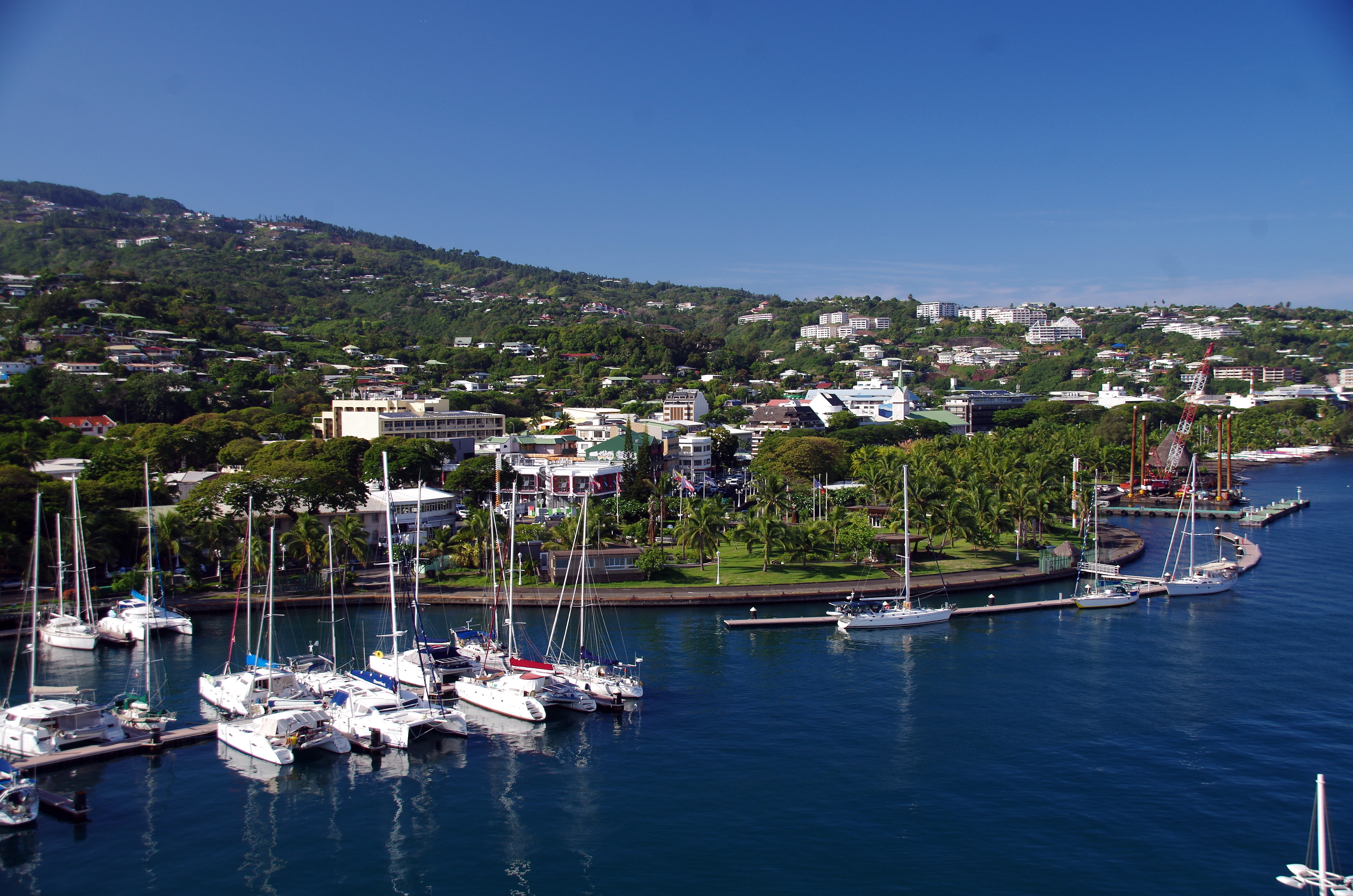 Papeete: Blick vom Hafen